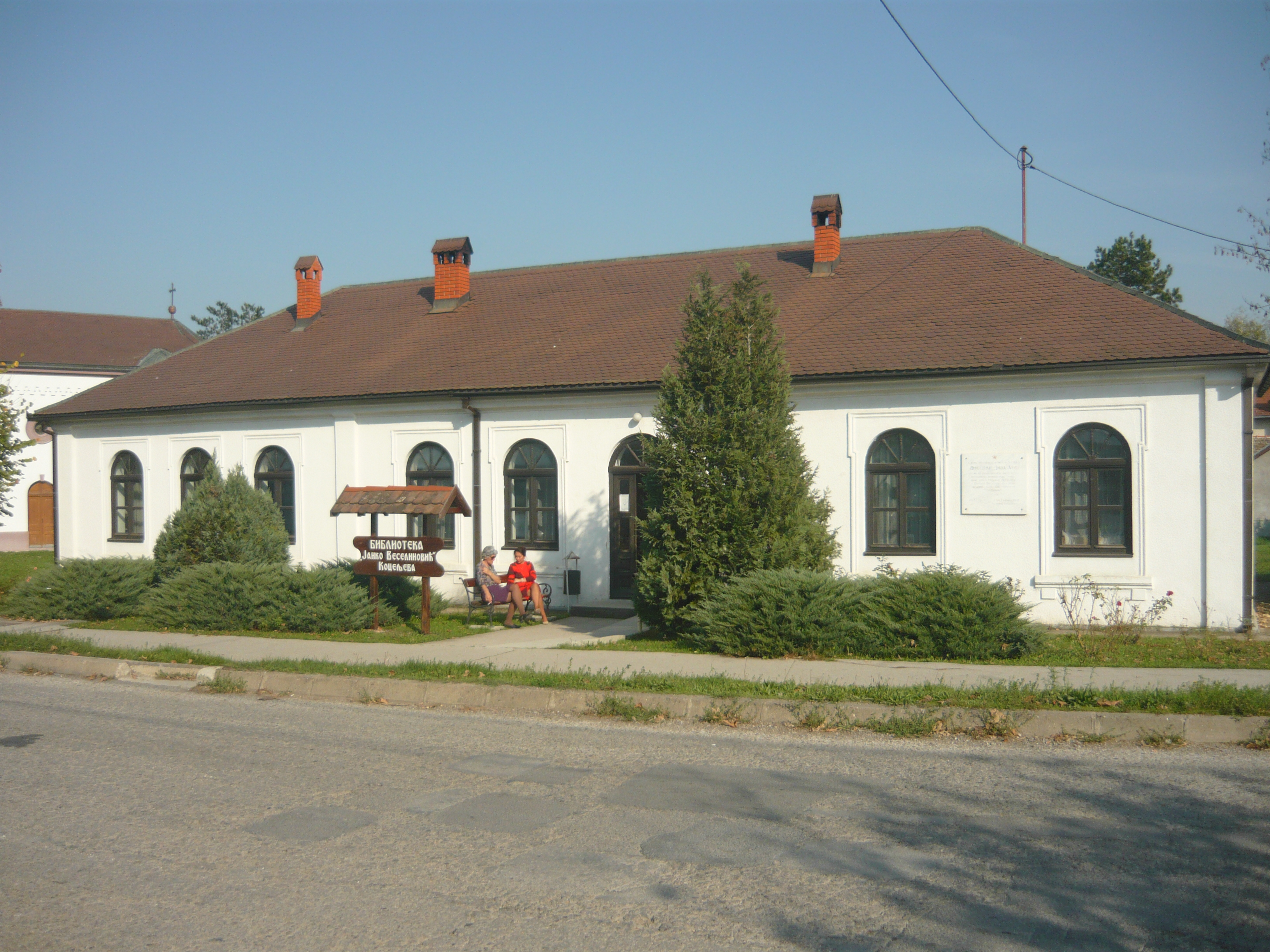 Садашња библиотека